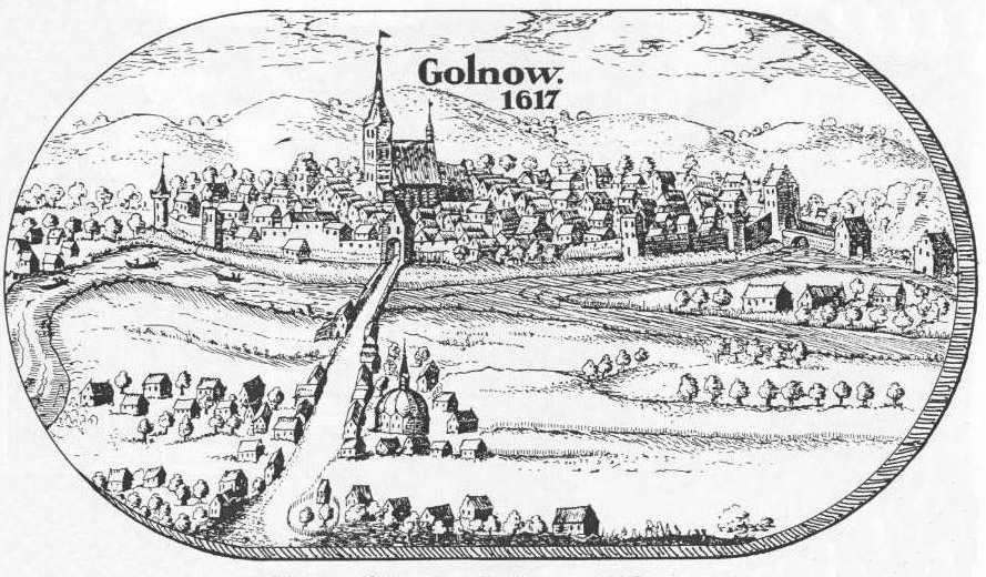 Historyczna mapa Lubinusa z 1617 r. - widok Goleniowa